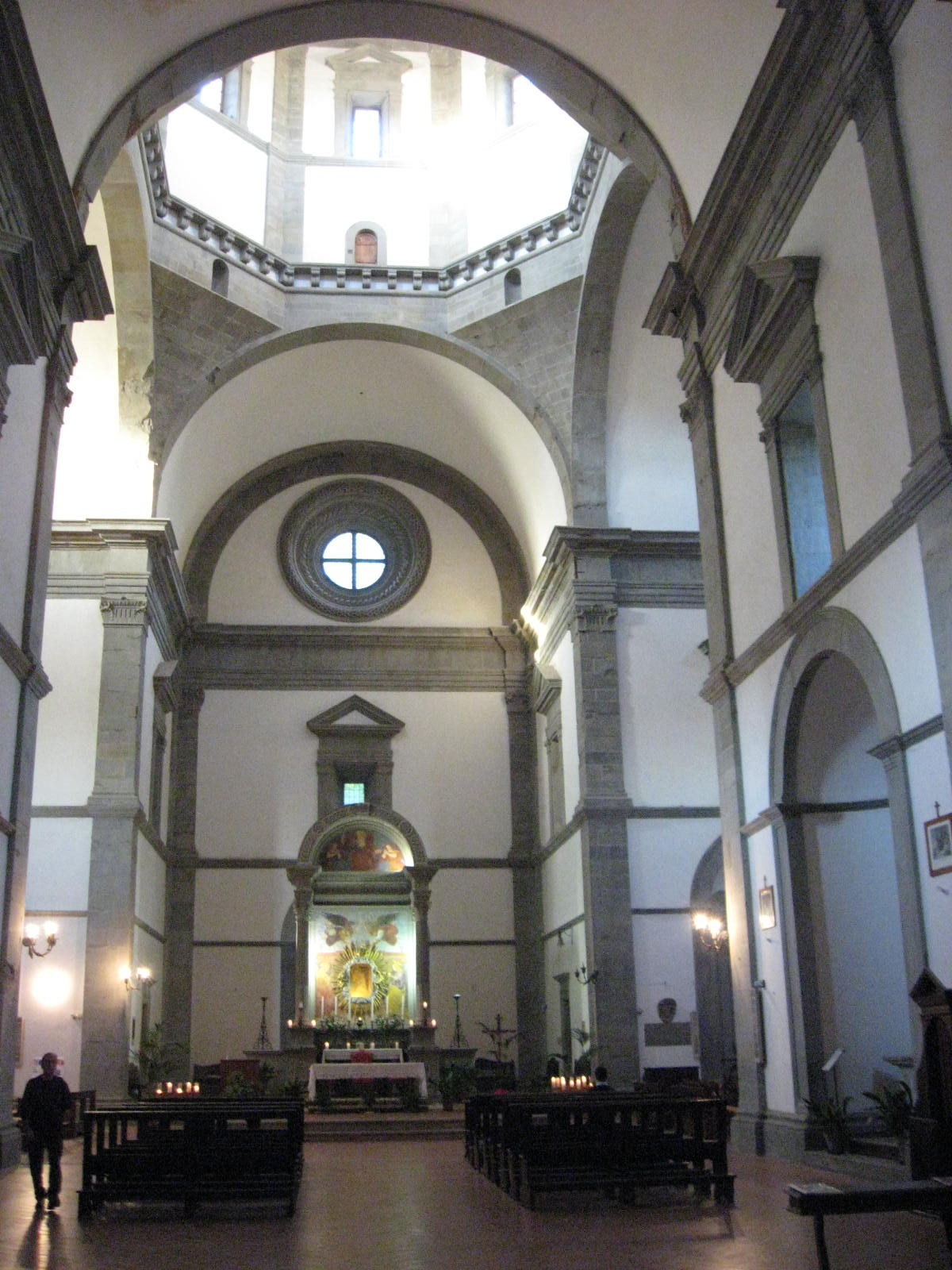 Interior of Santa Maria delle Grazie al Calcinaio (Cortona)